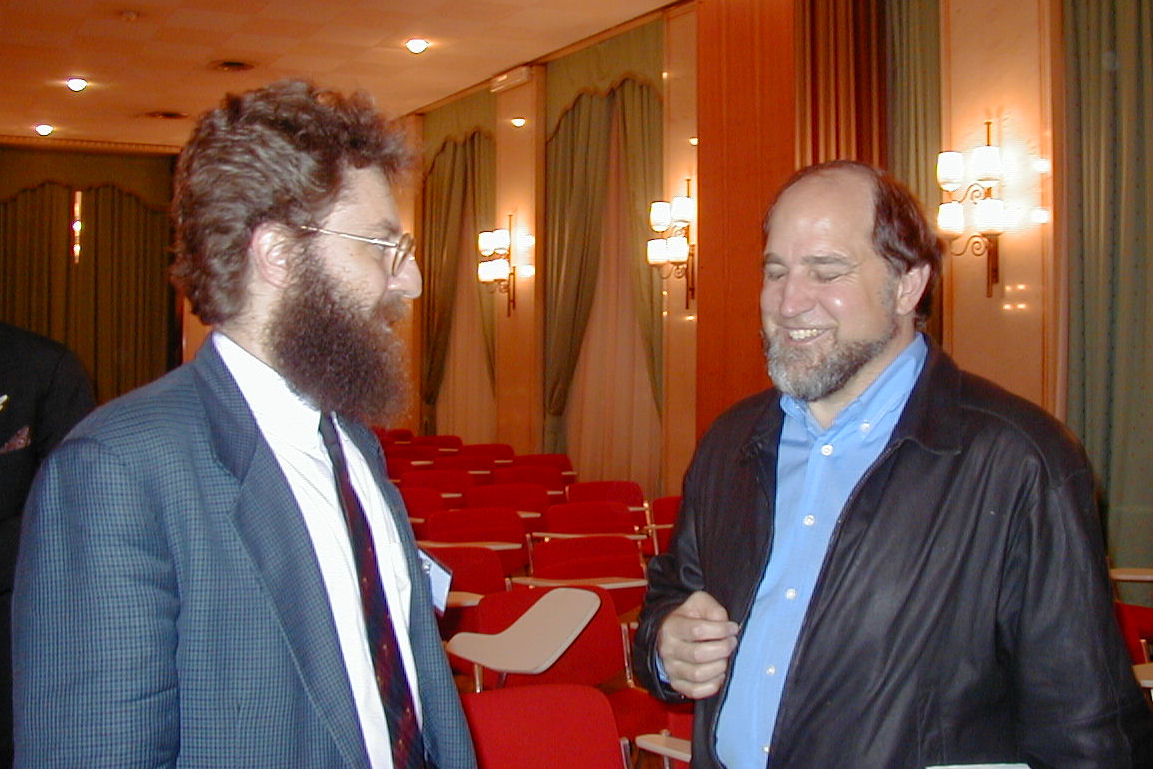 Corrado Giustozzi e Ron Rivest al meeting AES di Roma, 1999. Immagine inviata da Corrado Giustozzi.